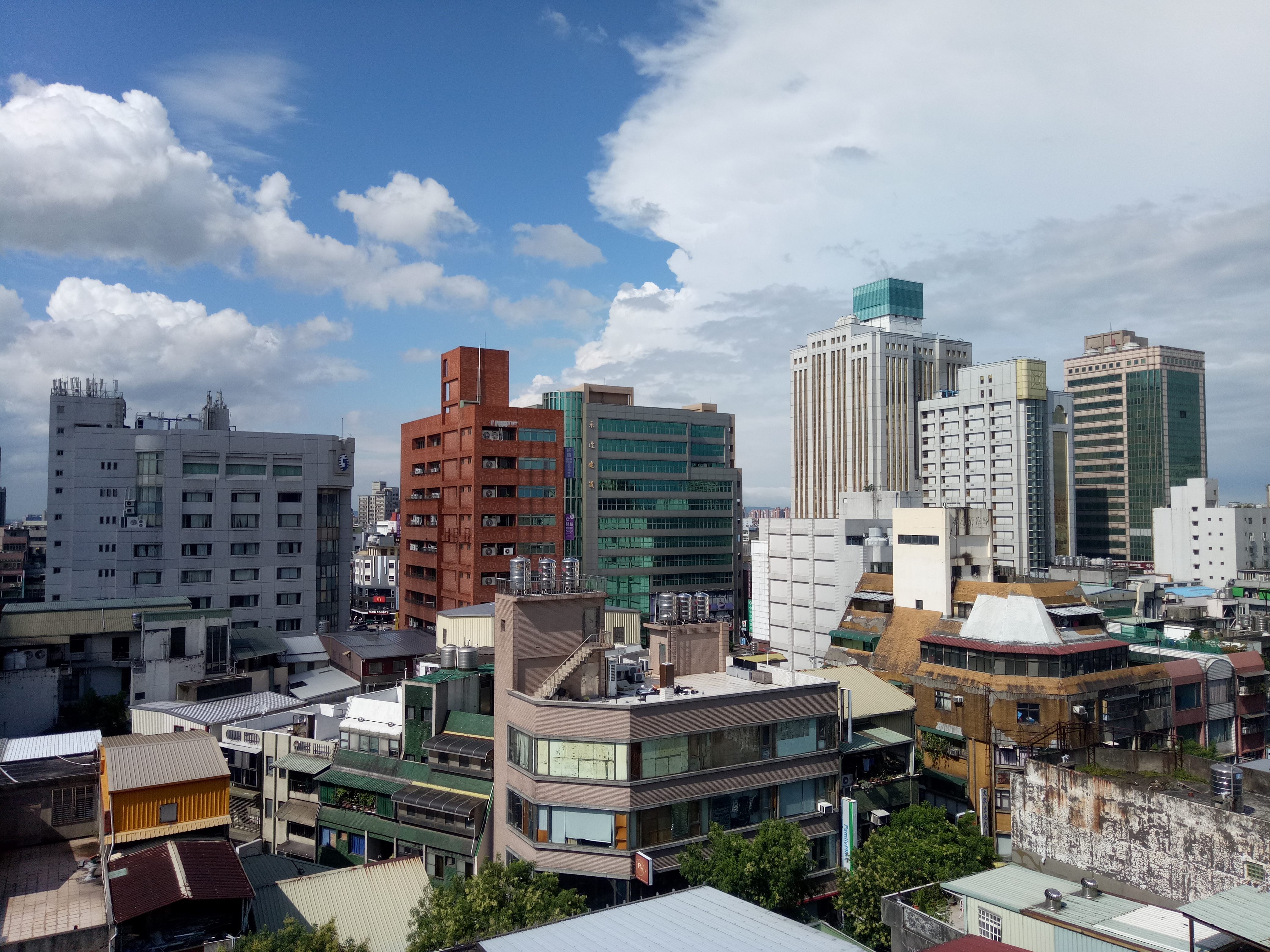 桃園市中壢區市景。（2019年）